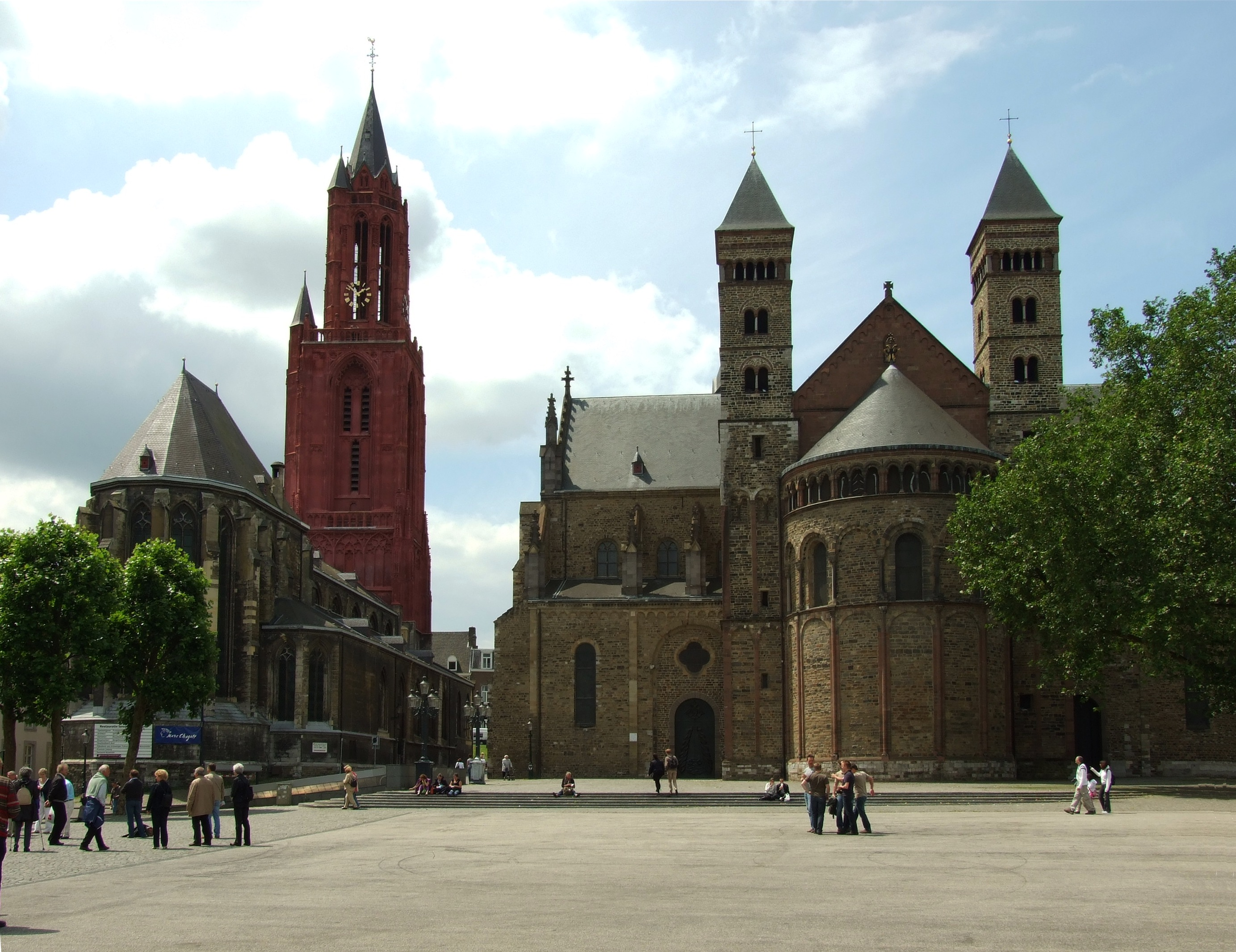 Vrijthof in Maastricht. De Sint Janskerk aan het Vrijthof. Rechts van de Sint-Jan, de Sint-Servaasbasiliek en de hoofdwacht.